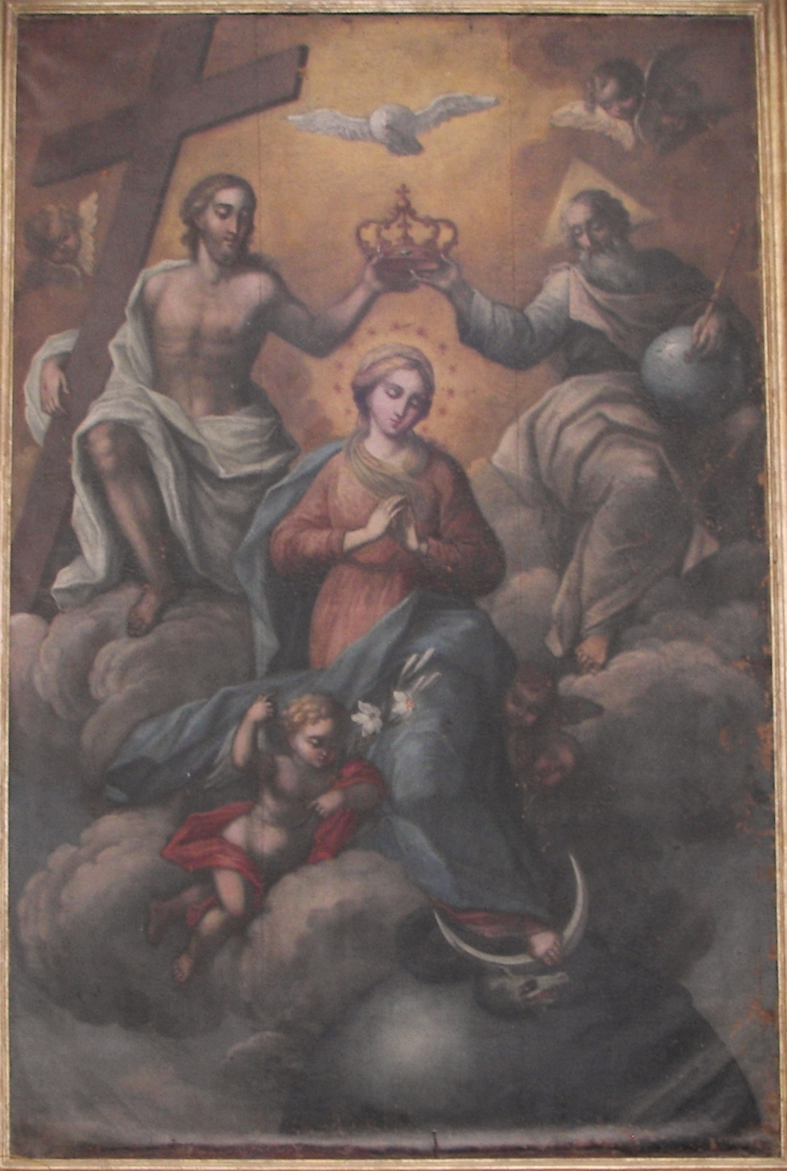 Tela di Maria SS. Incoronata Regina di sec XVIII